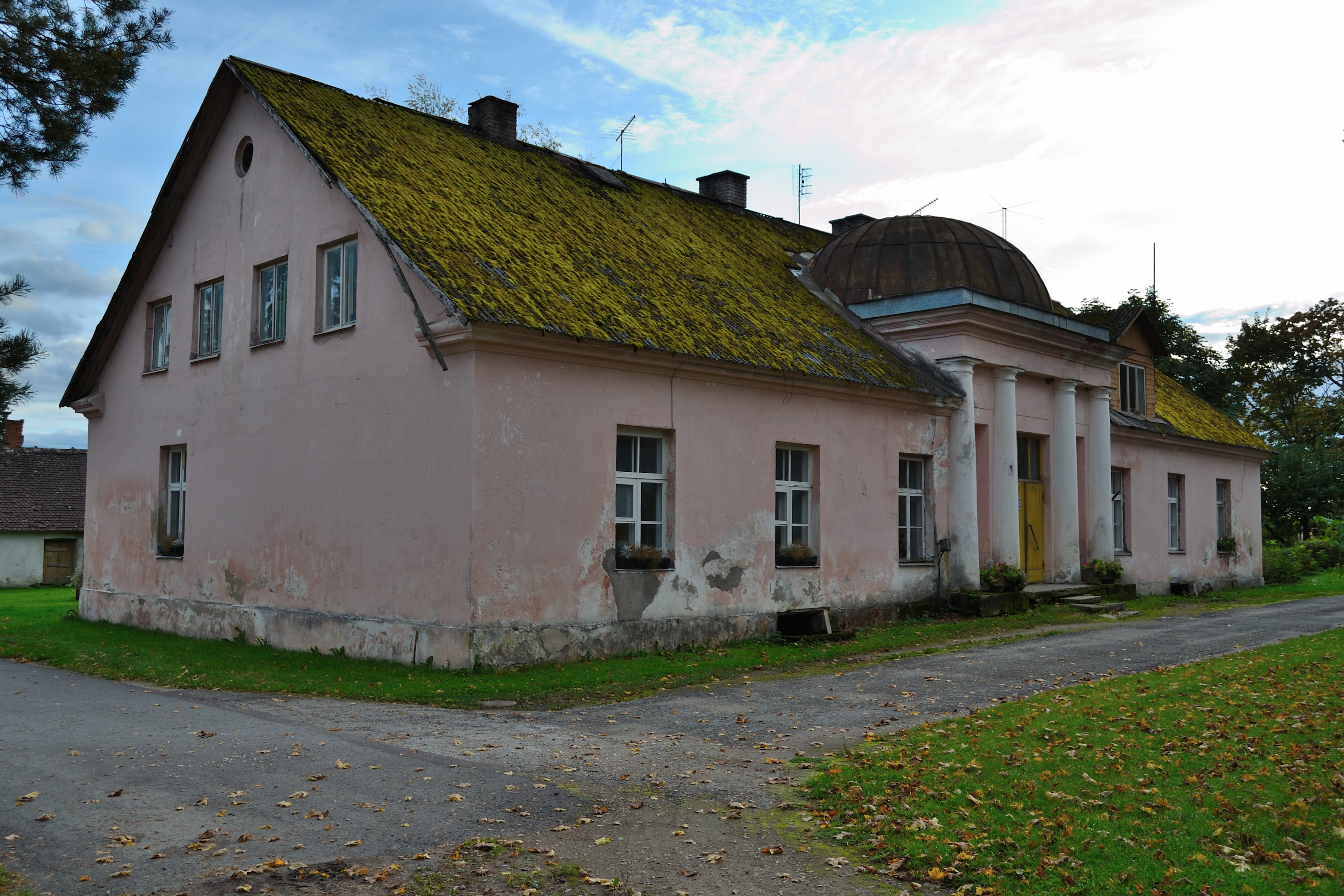 Valtu mõisa teenijatemaja 2